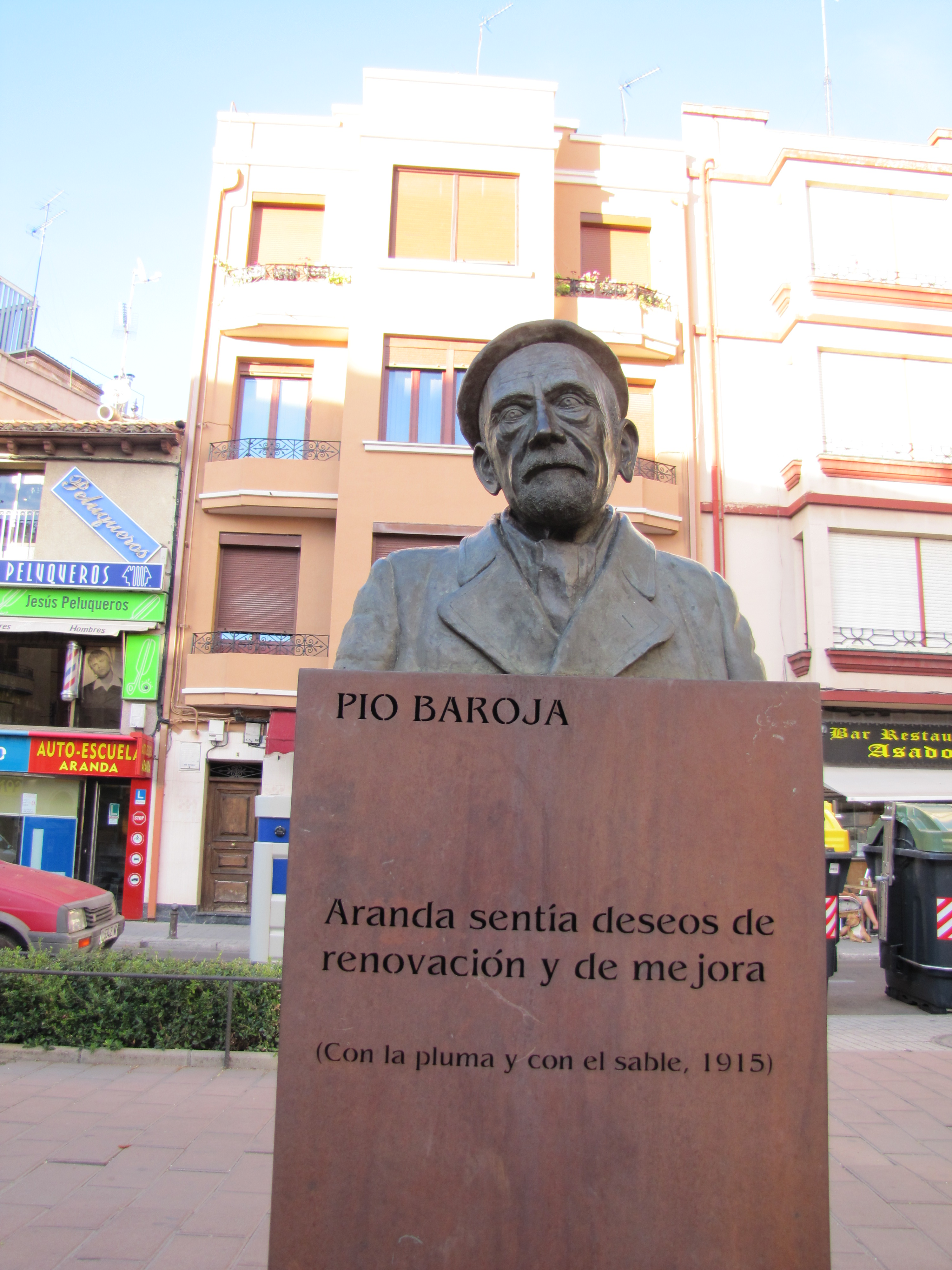 Escultura dedicada a Pío Baroja, en el centro de Aranda de Duero (Burgos). En recuerdo al libro que el escritor dedicó a la ciudad en 1915, "Con la Pluma y con el Sable".